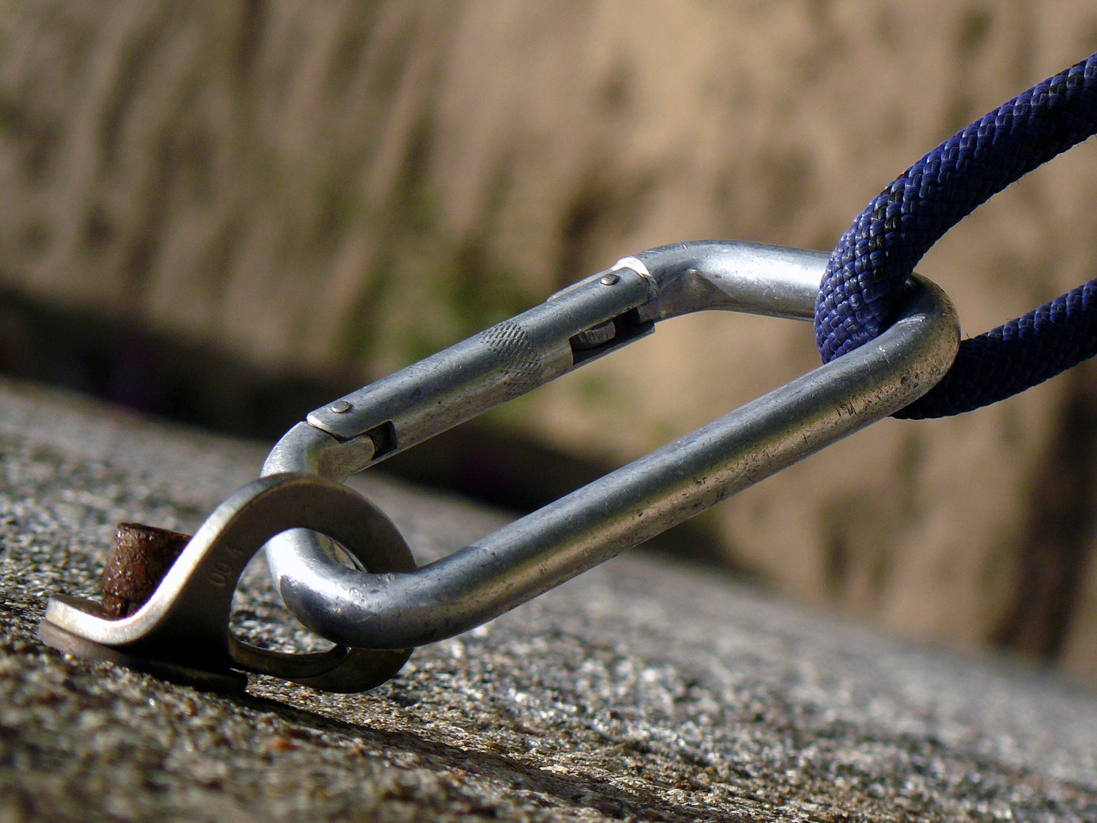 Carabiner